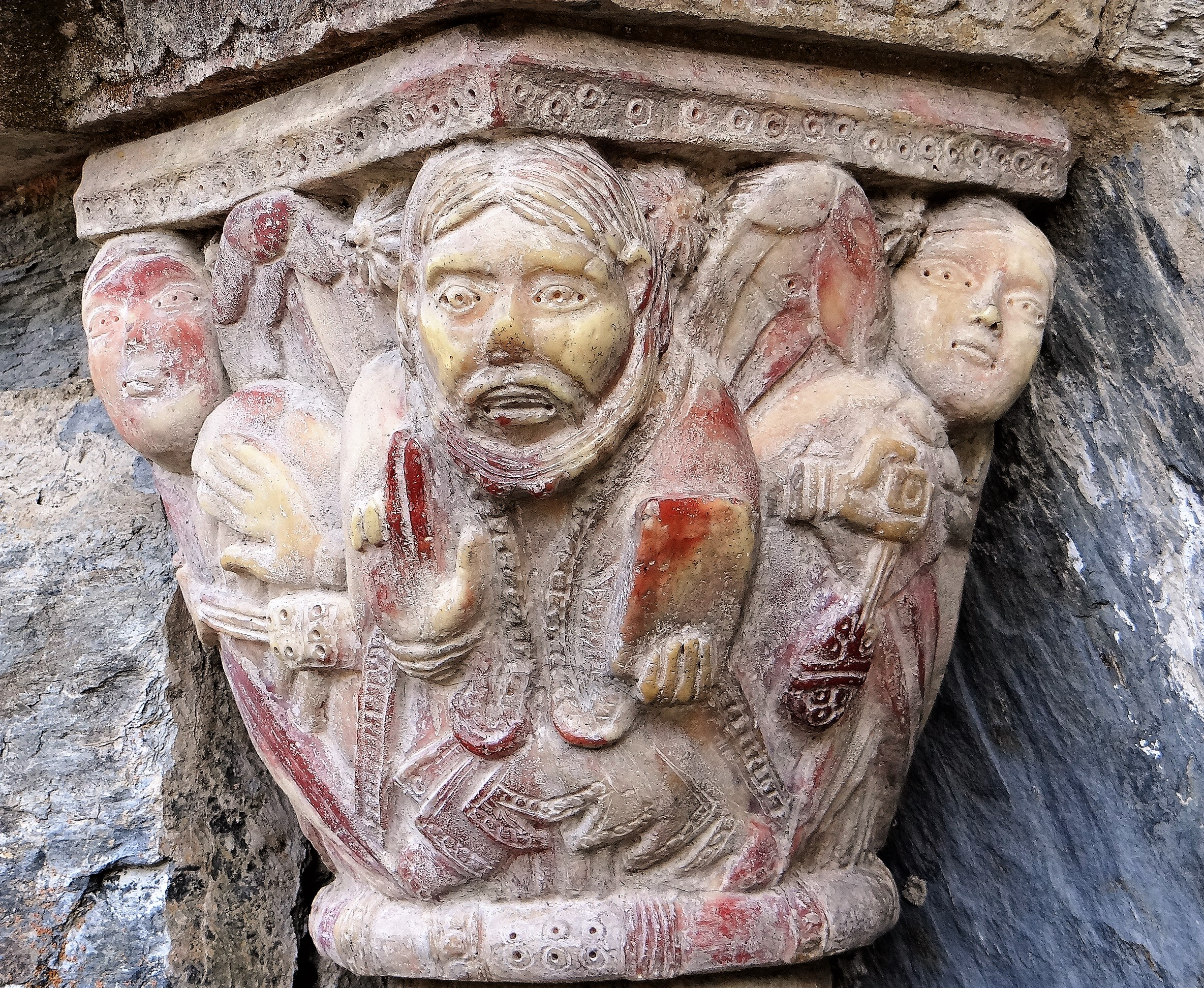 Prieuré de Serrabonne - Portail nord - Chapiteau à gauche de l'entrée : Christ bénissant entouré d'anges